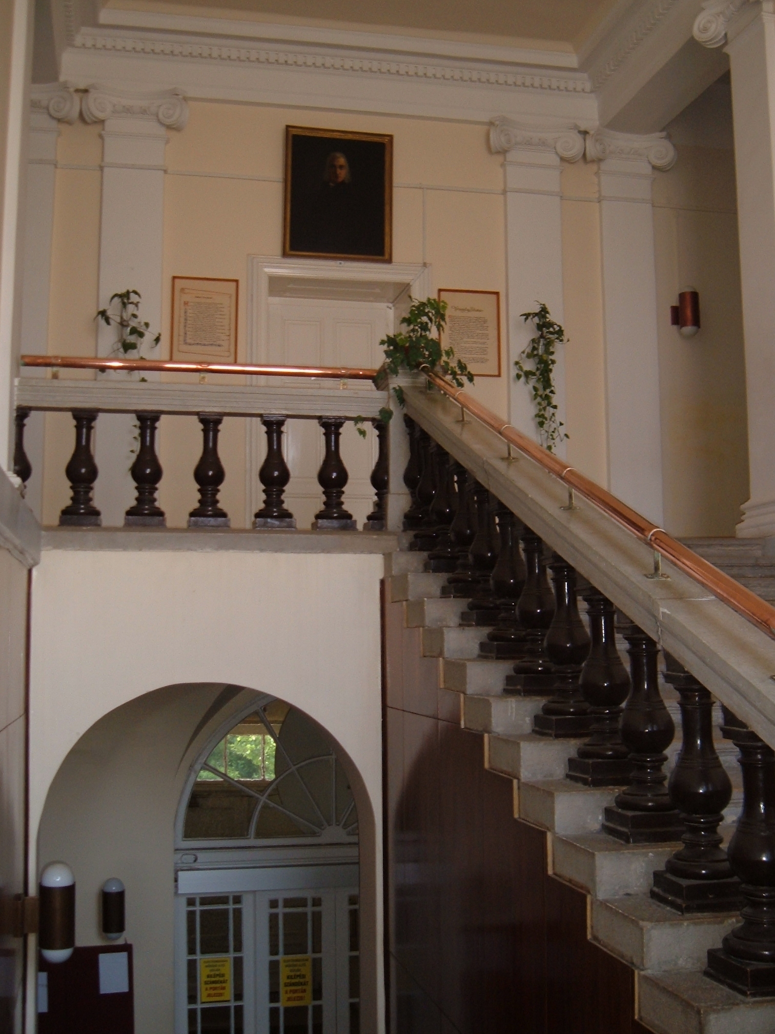 A szolnoki Verseghy Ferenc Gimnázium épülete belül